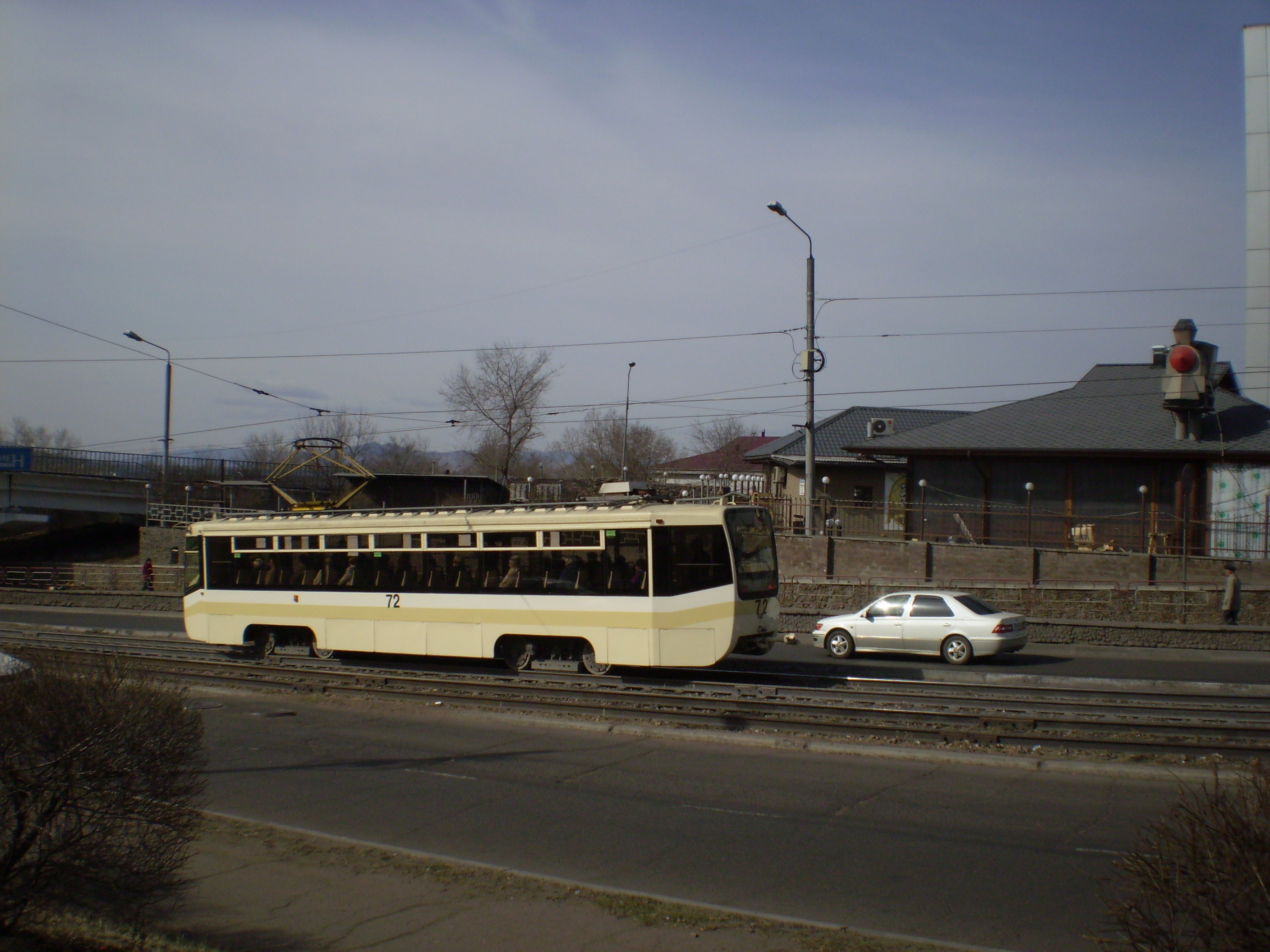 Трамвай в Улан-Удэ